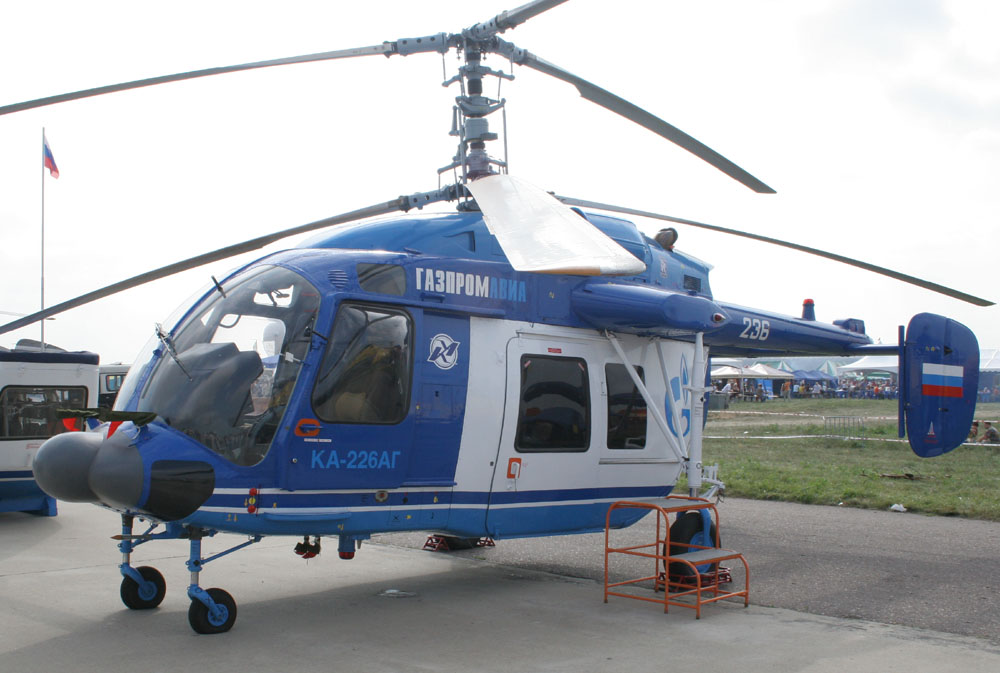 Вертолёт Ка-226АГ на МАКС-2007